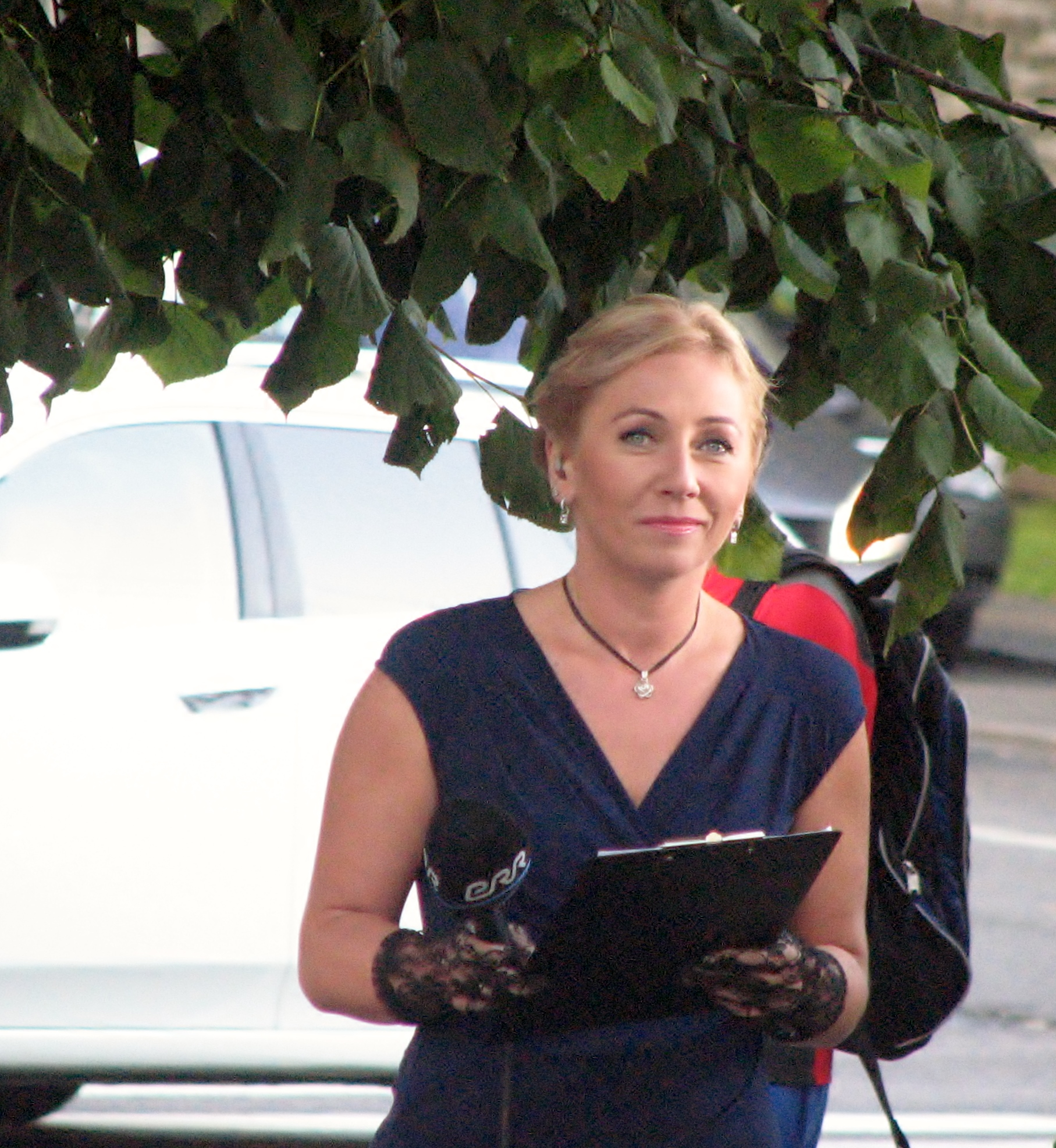 Monika Tamla Estonia awamise peo eel